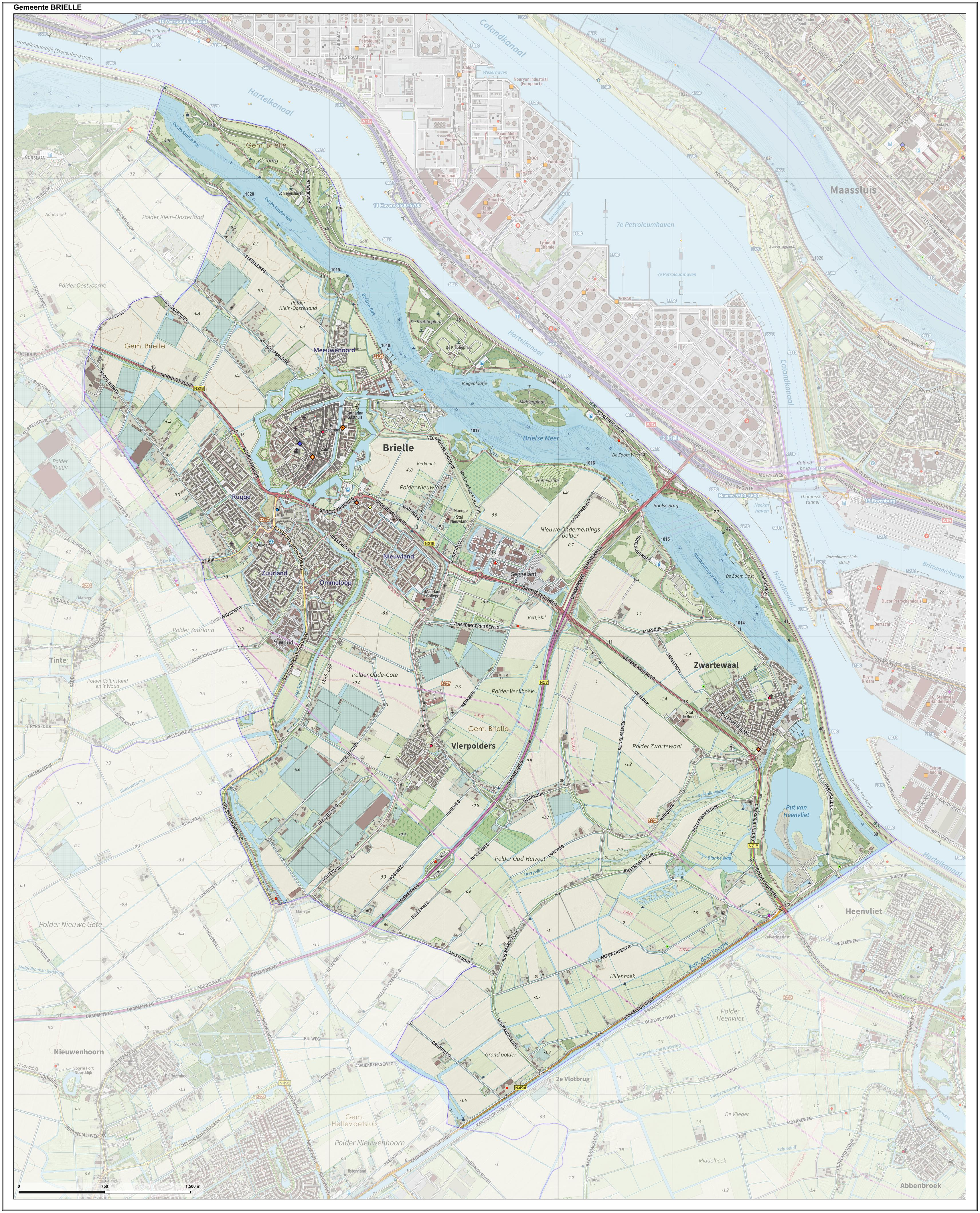 Topografische gemeentekaart. Resolutie: 400 pixels/km. Kaartbeeld samengesteld uit de open geodata van de Top10NL en Top25namen (Kadaster), Creative Commons-BY licentie. Gebouwvlakken uit open geodata BAG extract. Wegen uit de OpenStreetMap, OpenStreetMap community. Reliëfschaduw uit de Actuele Hoogtekaart AHN2. Samenstelling en kleurenschema: Jan-Willem van Aalst, met QGIS. Zie ook de Legenda.